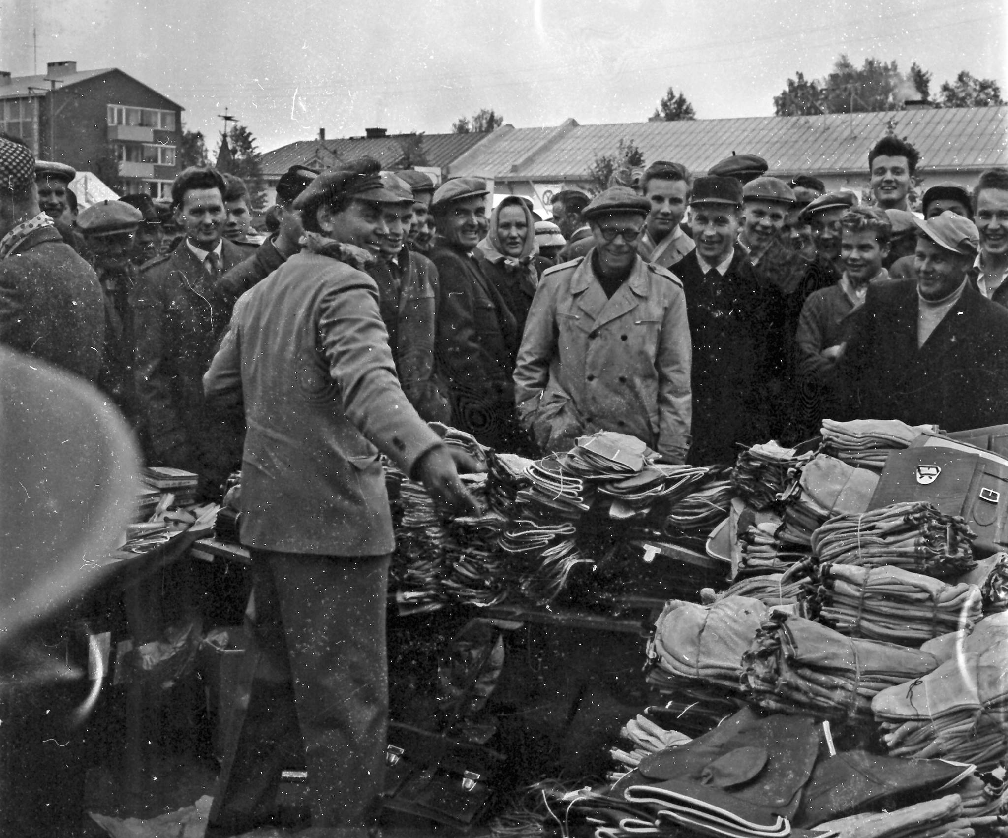 Helppo heikki Salon markkinoilla vuonna 1959